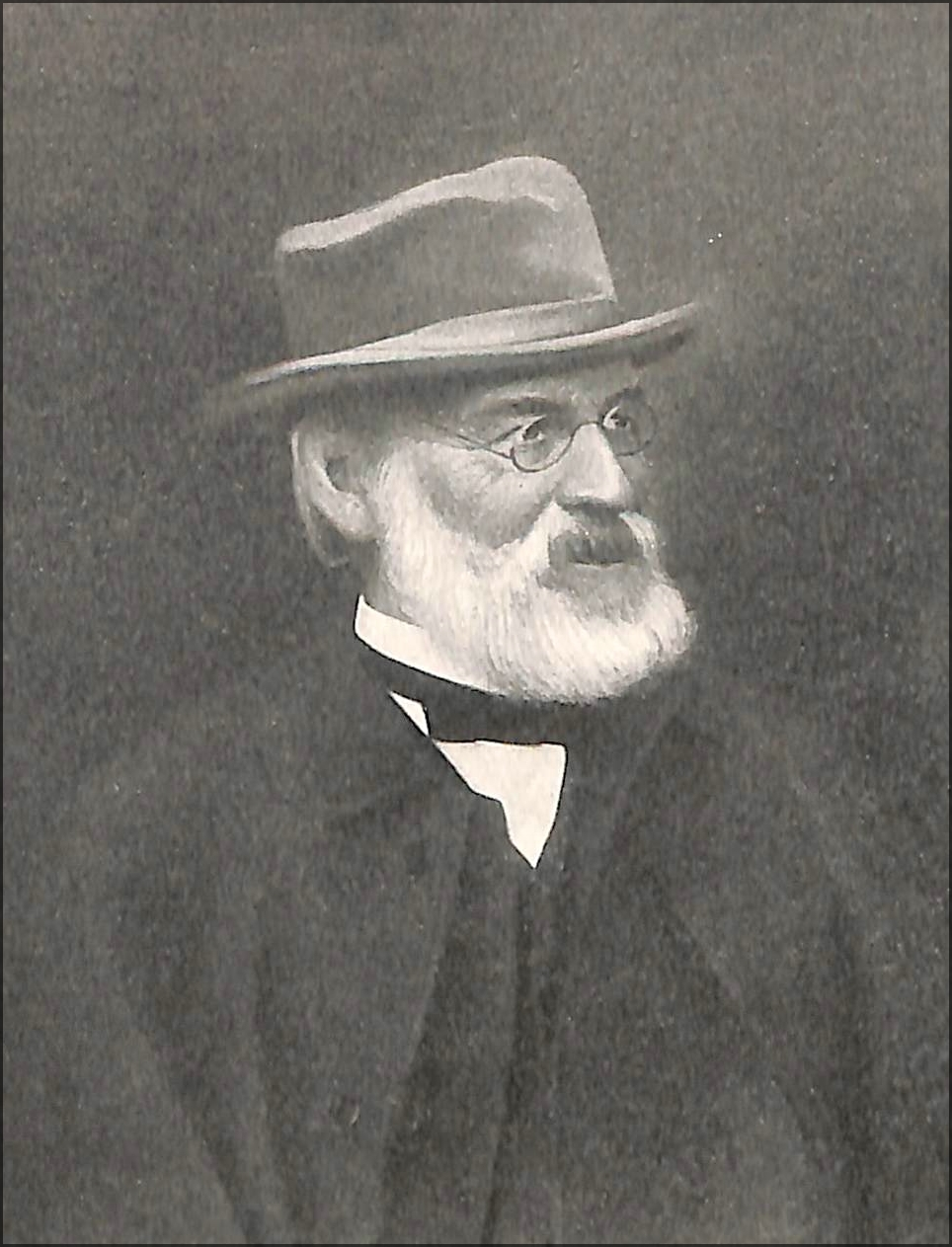 Clemens Müller, Fabrikant von Schreibmaschinen aus Dresden.